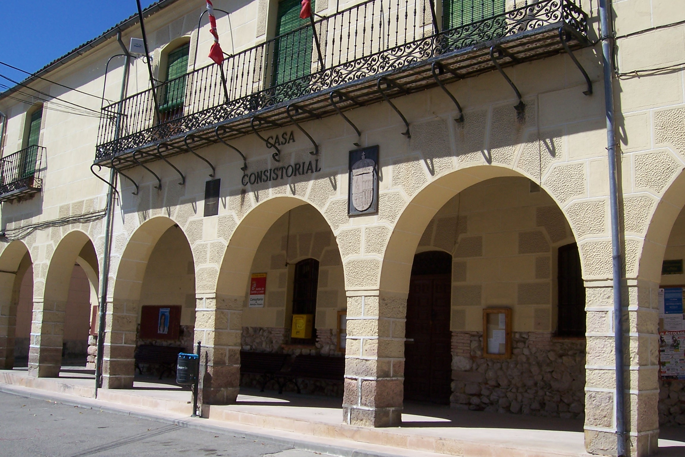 Muñoveros es un pueblo de España, en la provincia de Segovia, comunidad autónoma de Castilla y León. Casa Consistorial.